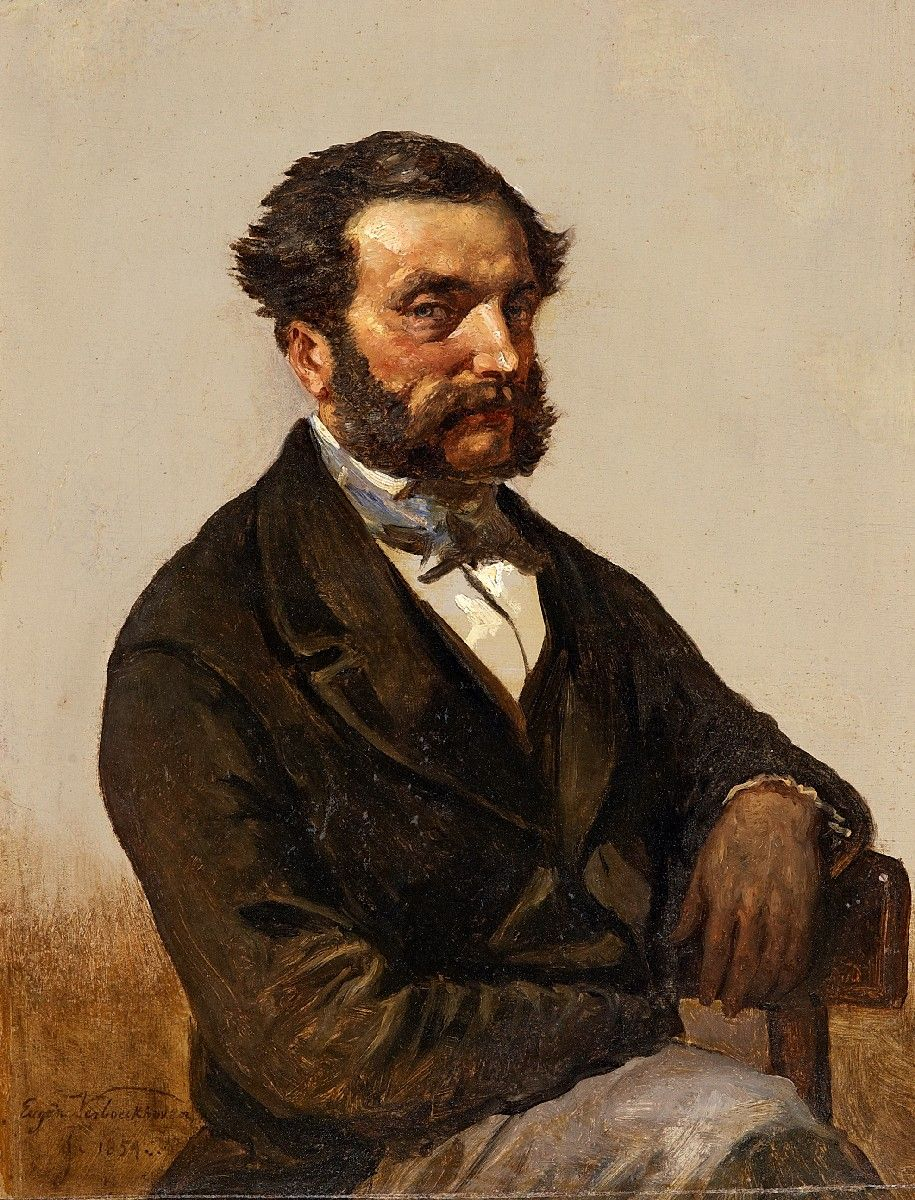 Selbstporträt. Signiert und datiert unten links: Eugene Verboeckhoven fe 1854. Öl auf Papier. Auf Sperrholzplatte gezogen. 33 x 24 cm.